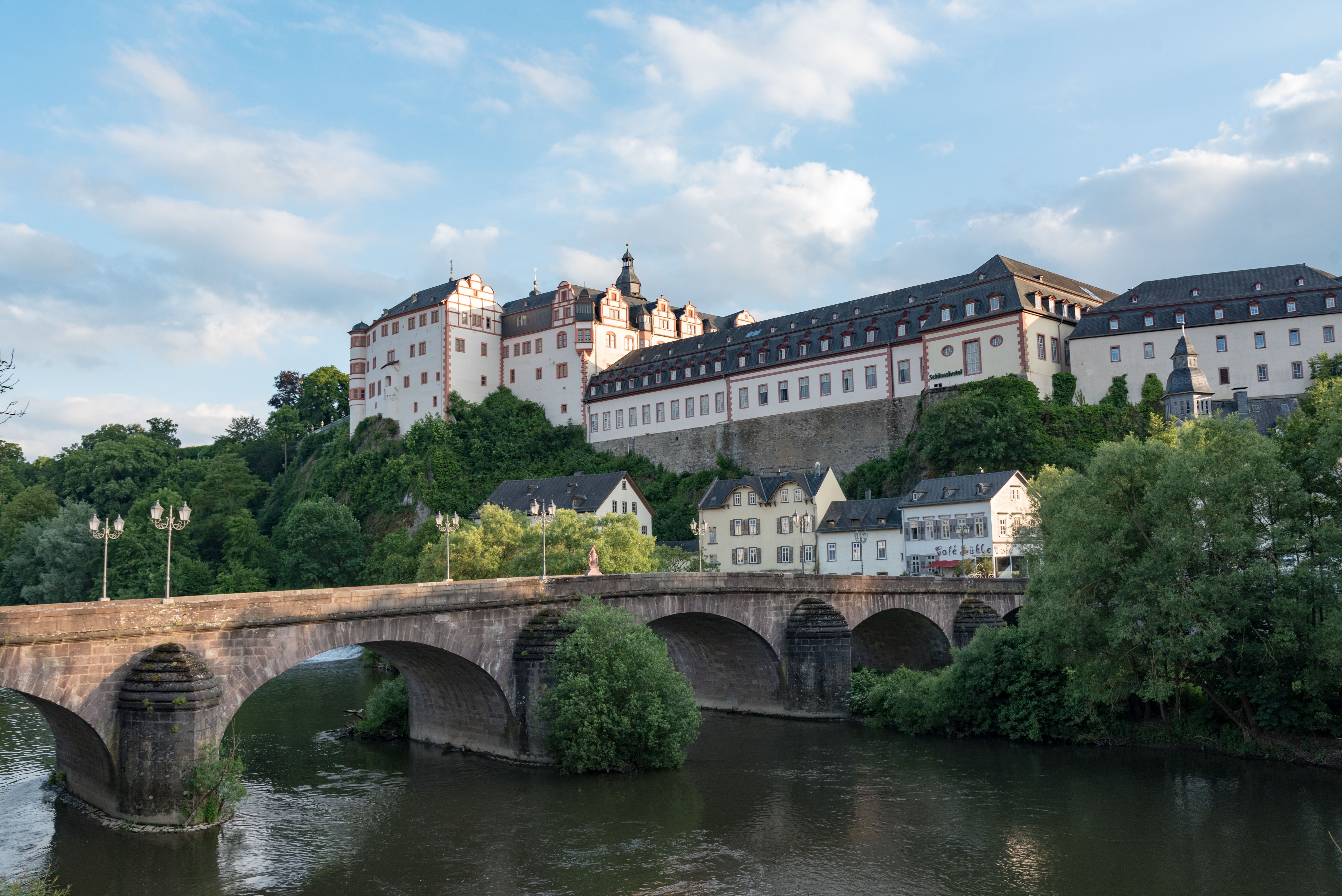 Weilburg, Schloss und Lahnbrücke, Ansicht von Osten